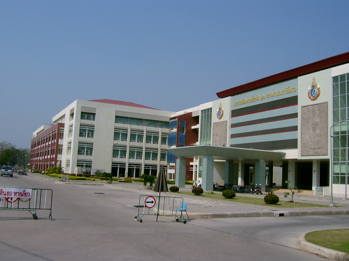 QS